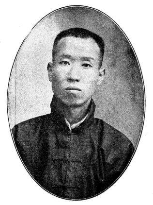 中文（台灣）: 中華民國國會議員